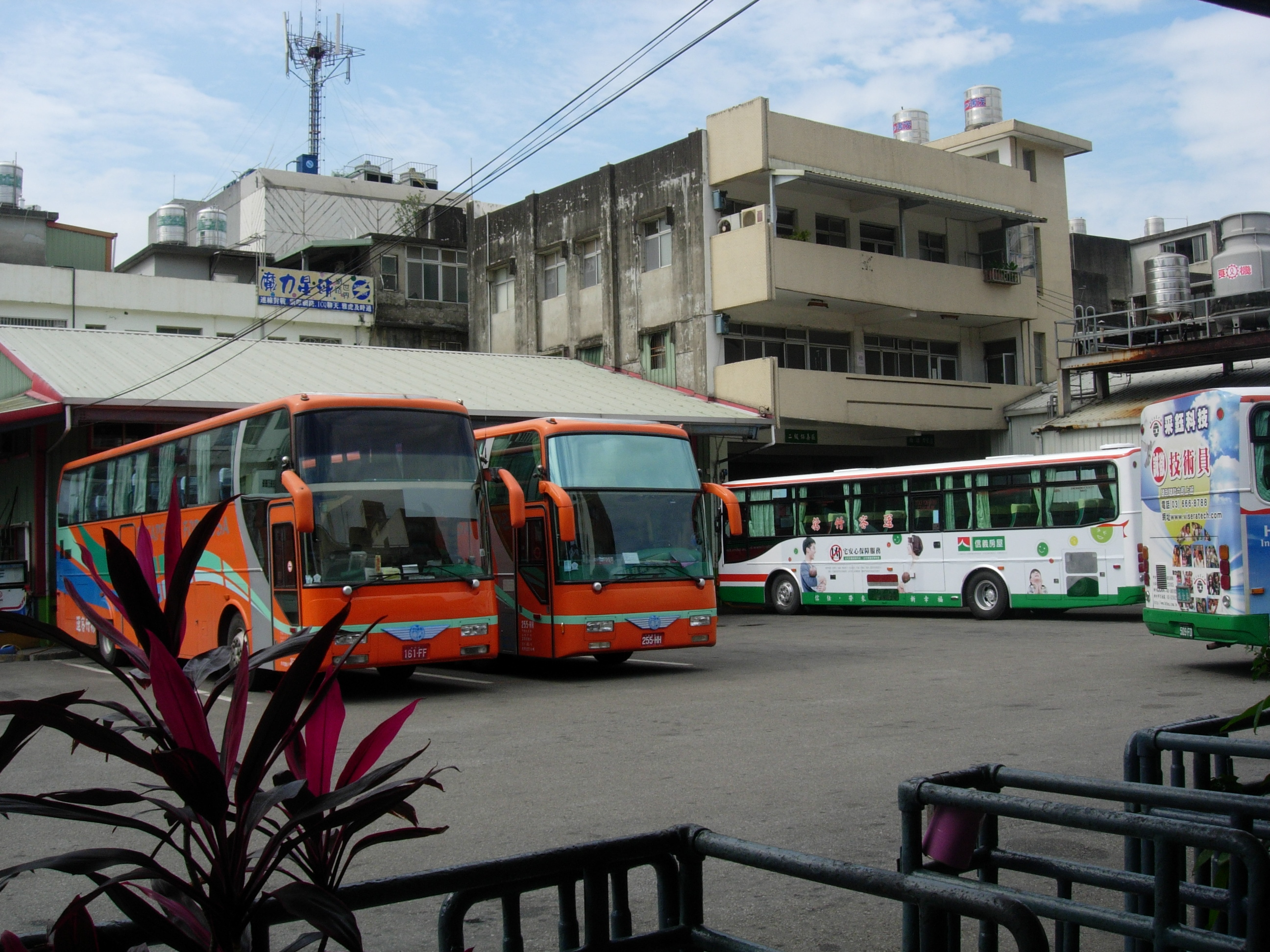 中文（台灣）: 新竹客運關西站停車場